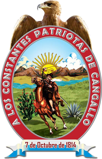 Cangallo, Ayacucho, Perú